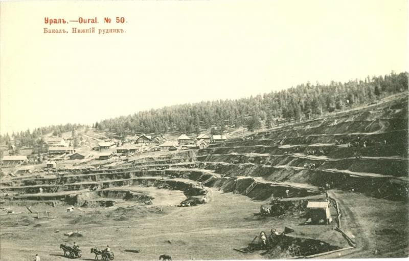 Нижний рудник, 1907 год. г. Бакал